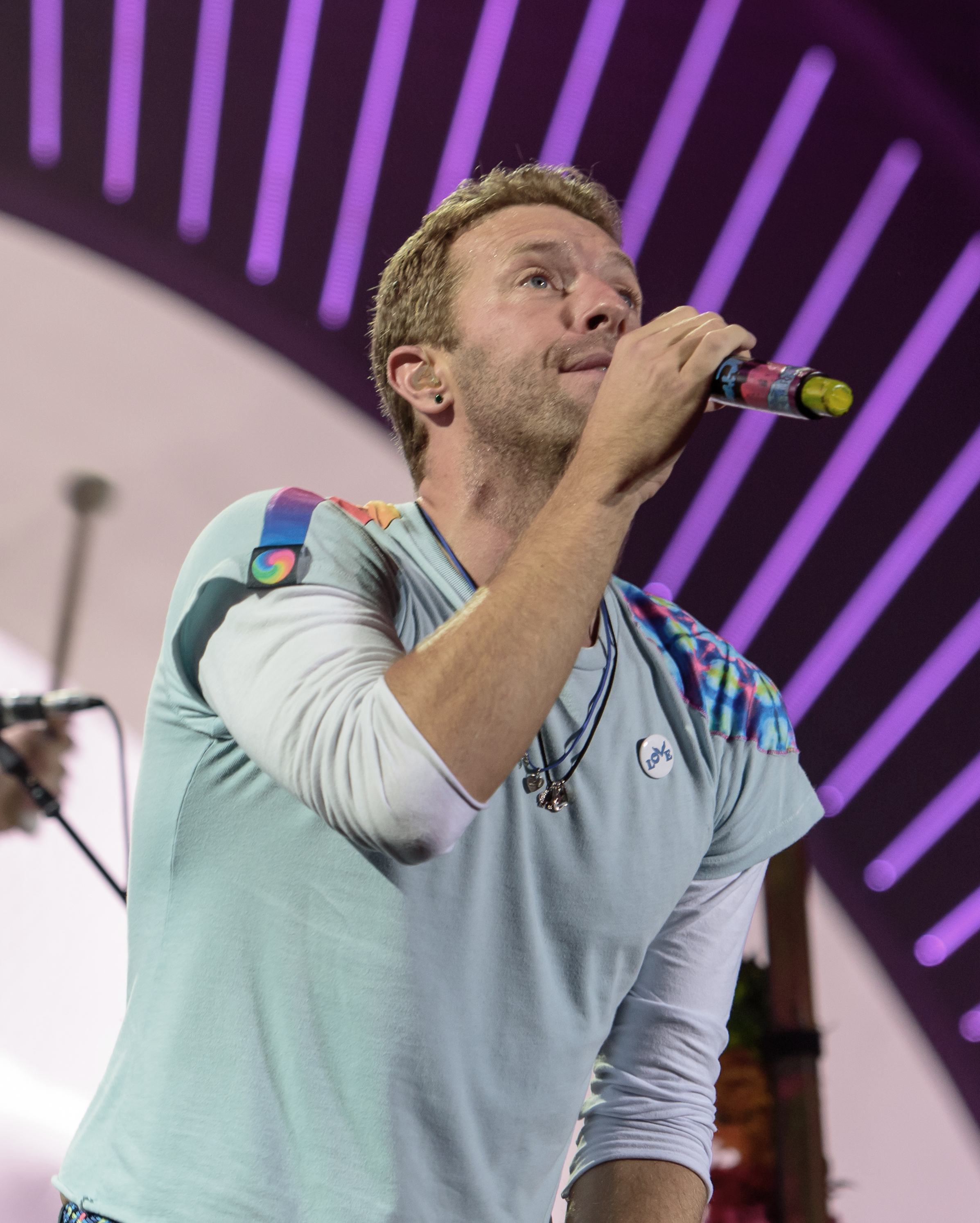 Chris Martin beim Global Citizen Festival in Hamburg